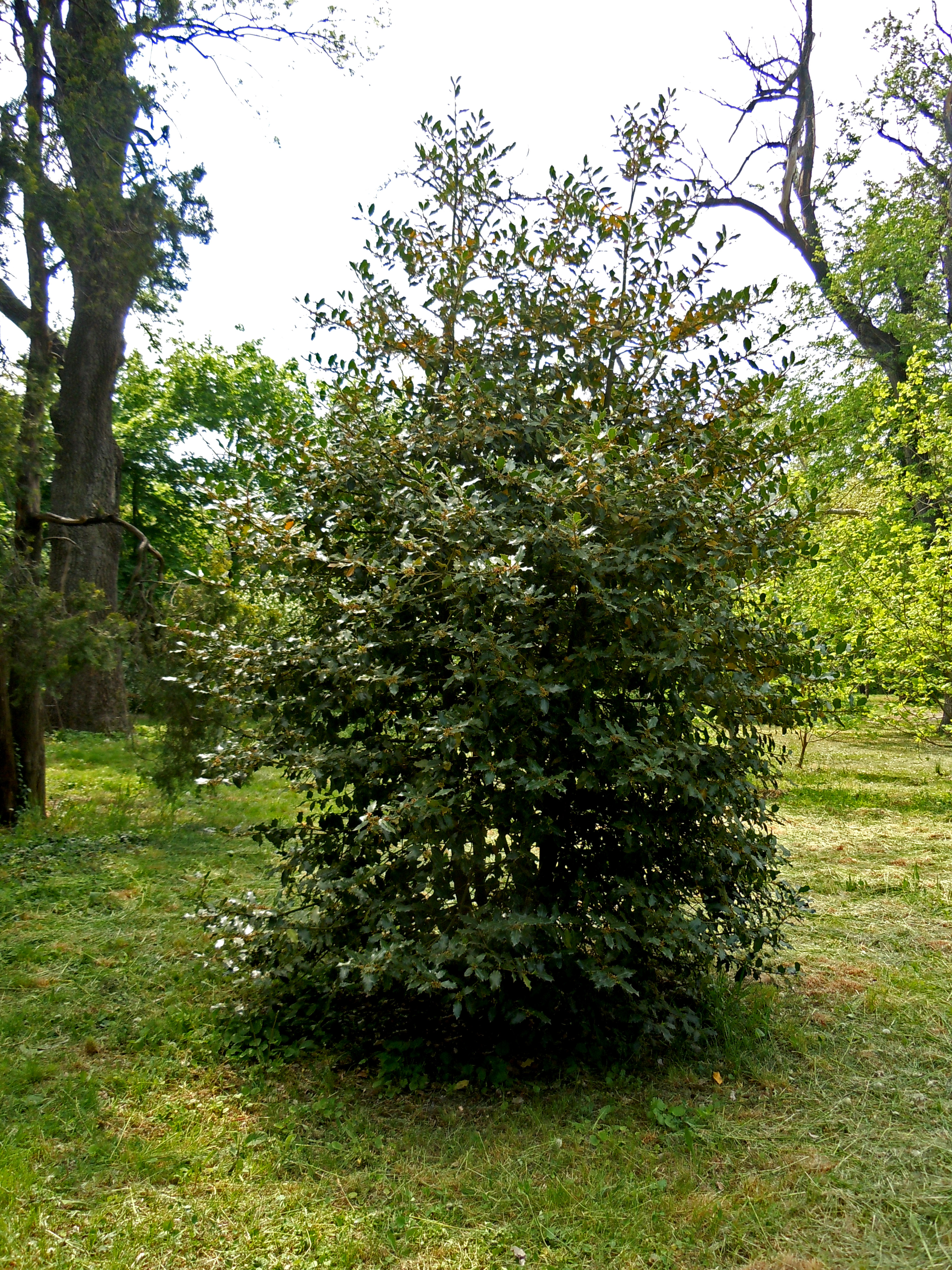 Падуб гостролистий (Ilex aquifolium), Ботанічний сад ОНУ, м. Одеса, Французький бульвар, 48/50, 87